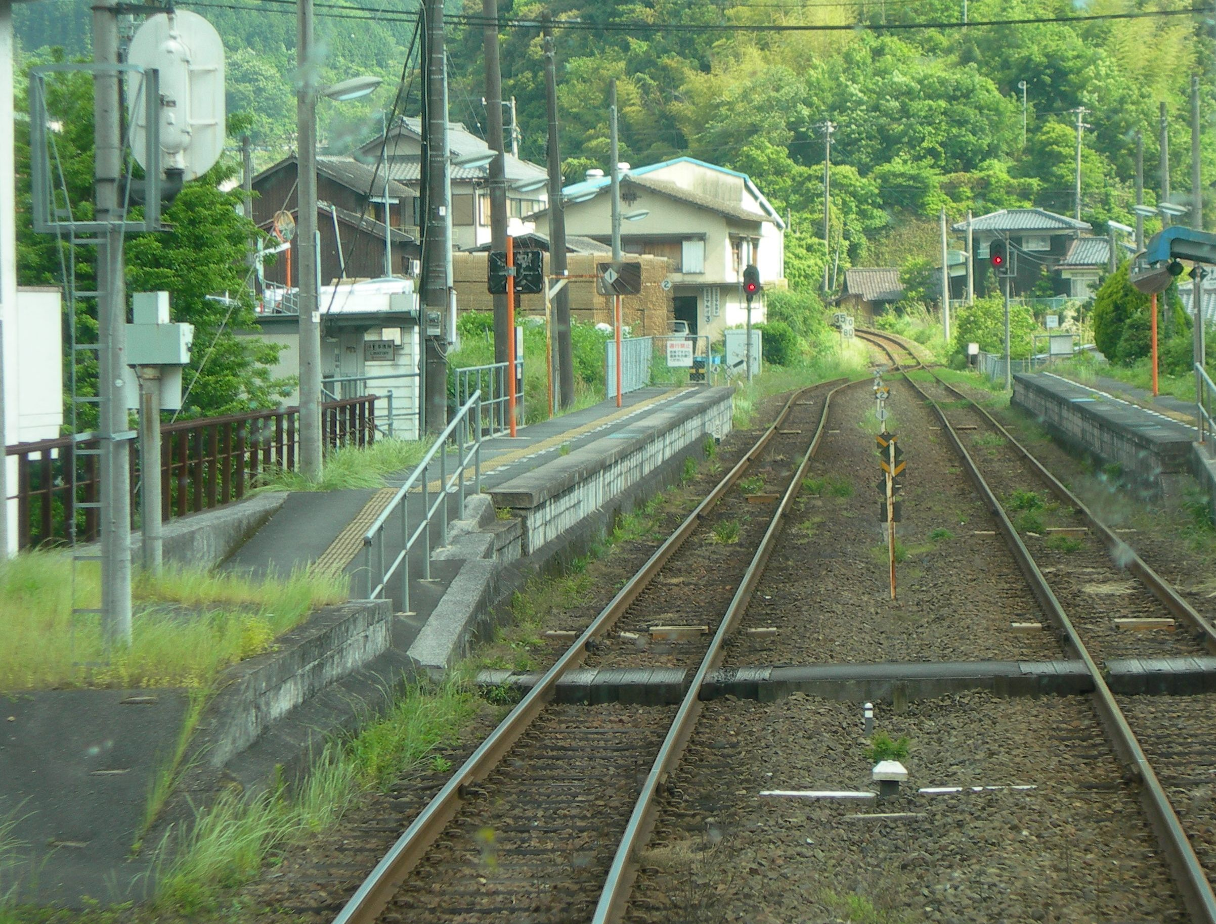 双岩駅ホーム